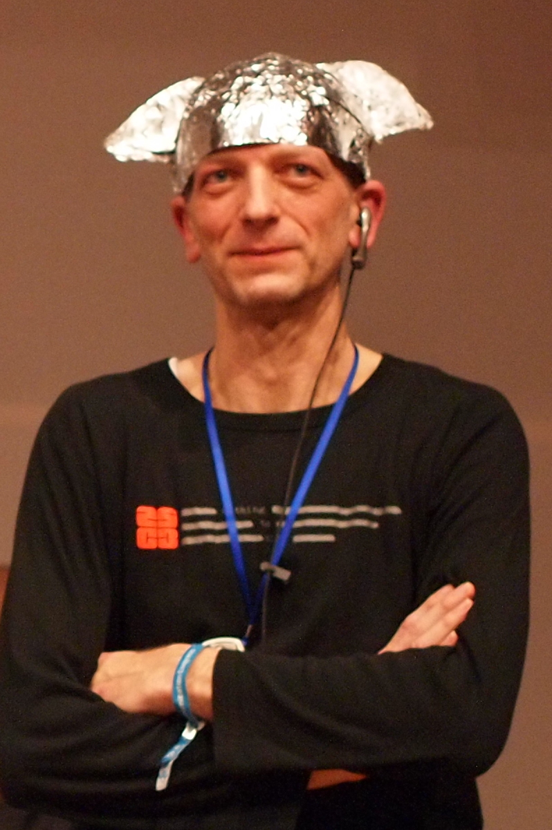 Mann mit Aluminium-Hut auf dem 30C3